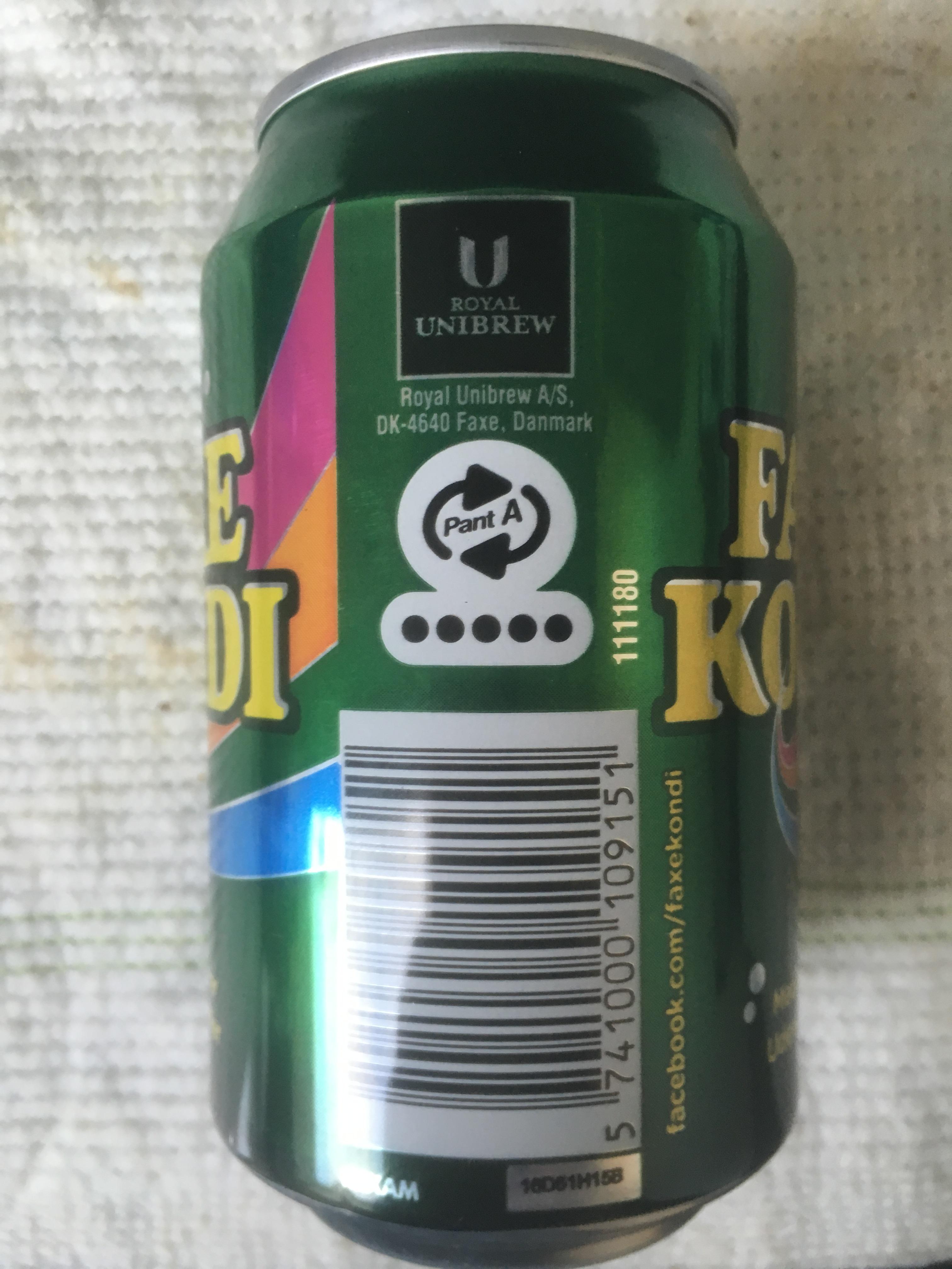 Faxe Kondi dåse